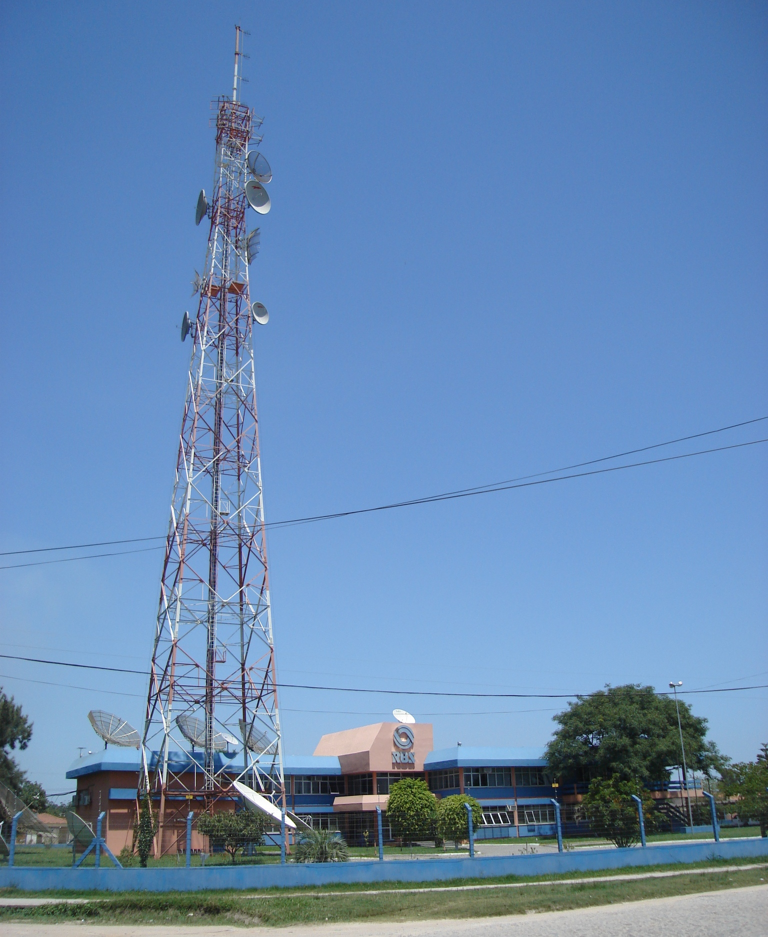 Sede da RBS TV Pelotas.